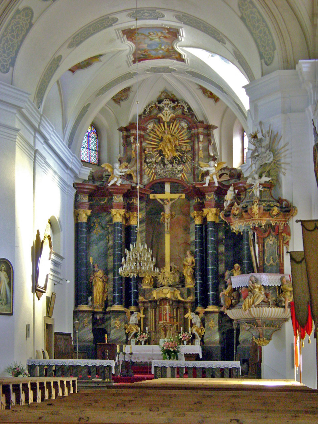 Nowa Wieś - Kościół p.w. Wniebowzięcia NMP, 1 poł. XVIII, 1804 (zabytek nr A/1686/885 z 30.06.1961)